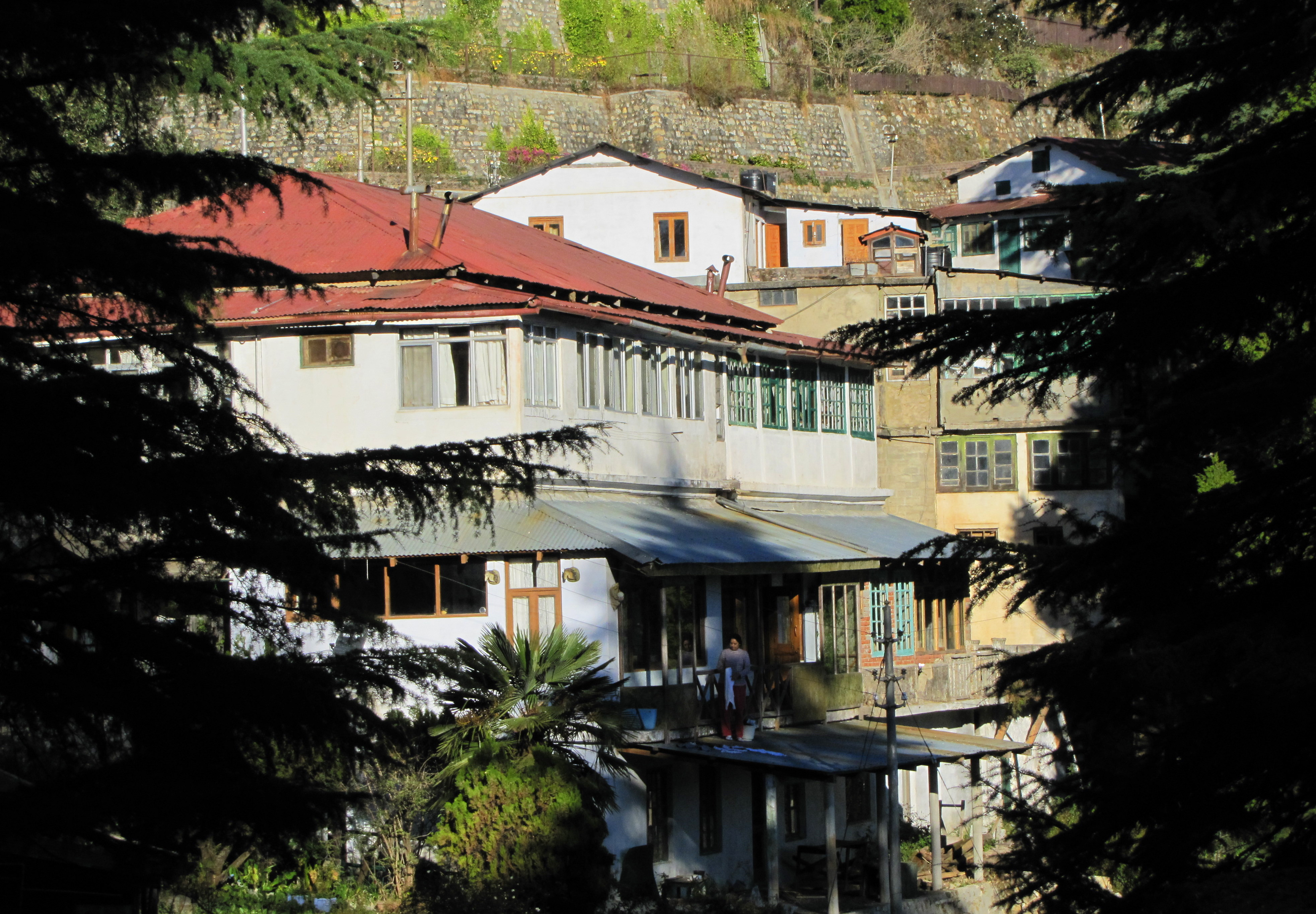 Sisters Bazaar